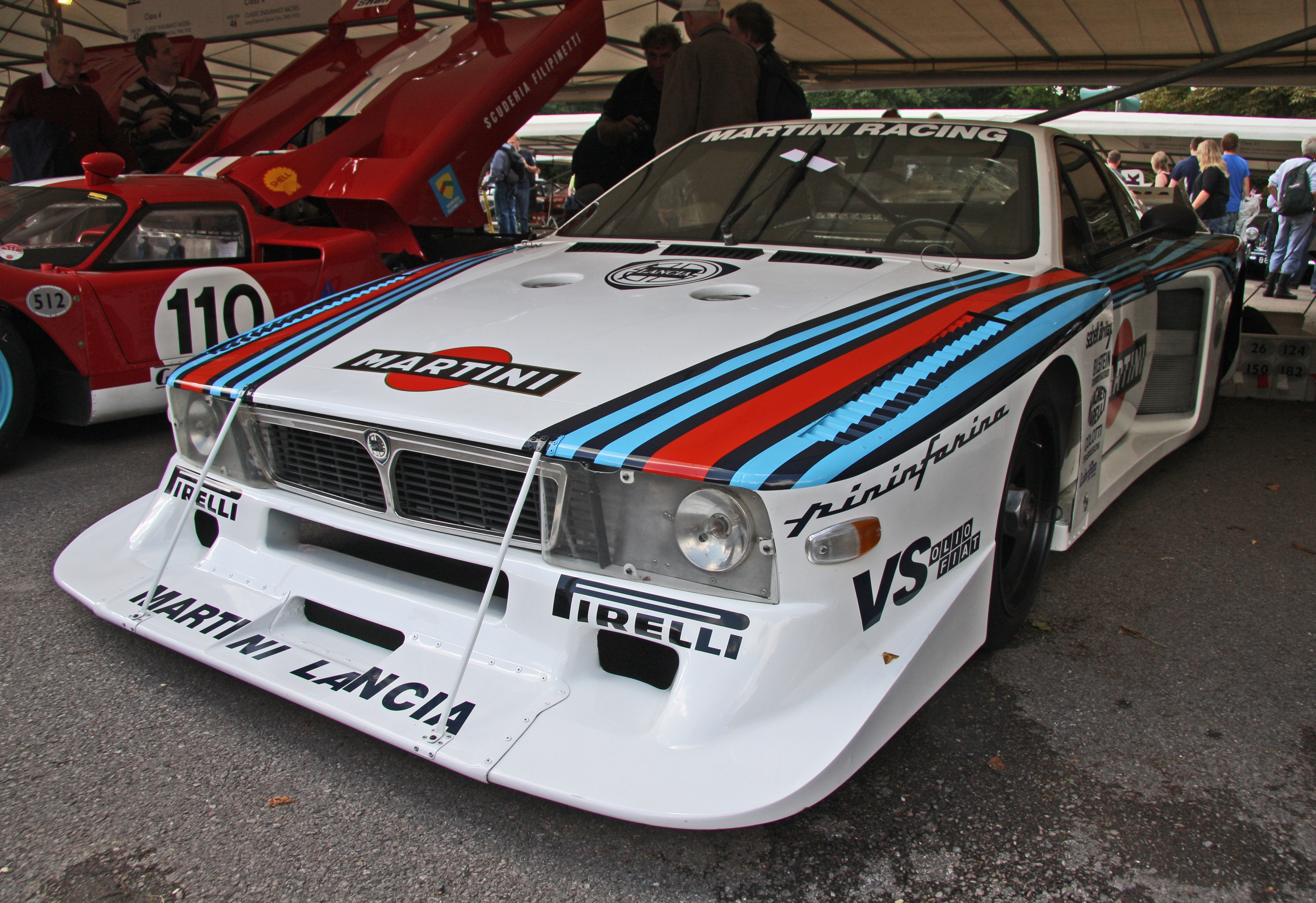 Built 1981. 1.4 litre 4 cylinder